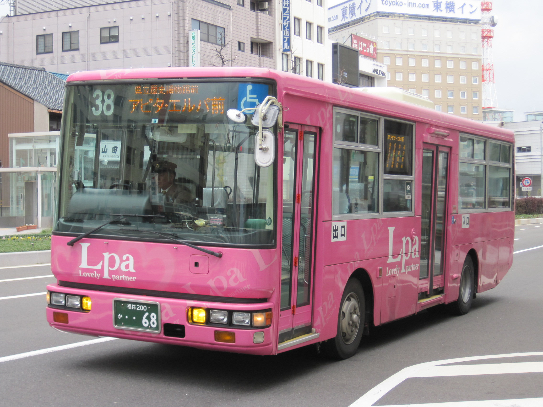 京福バスのノンステップバス、ラブリーパートナーエルパのラッピングが施されている。